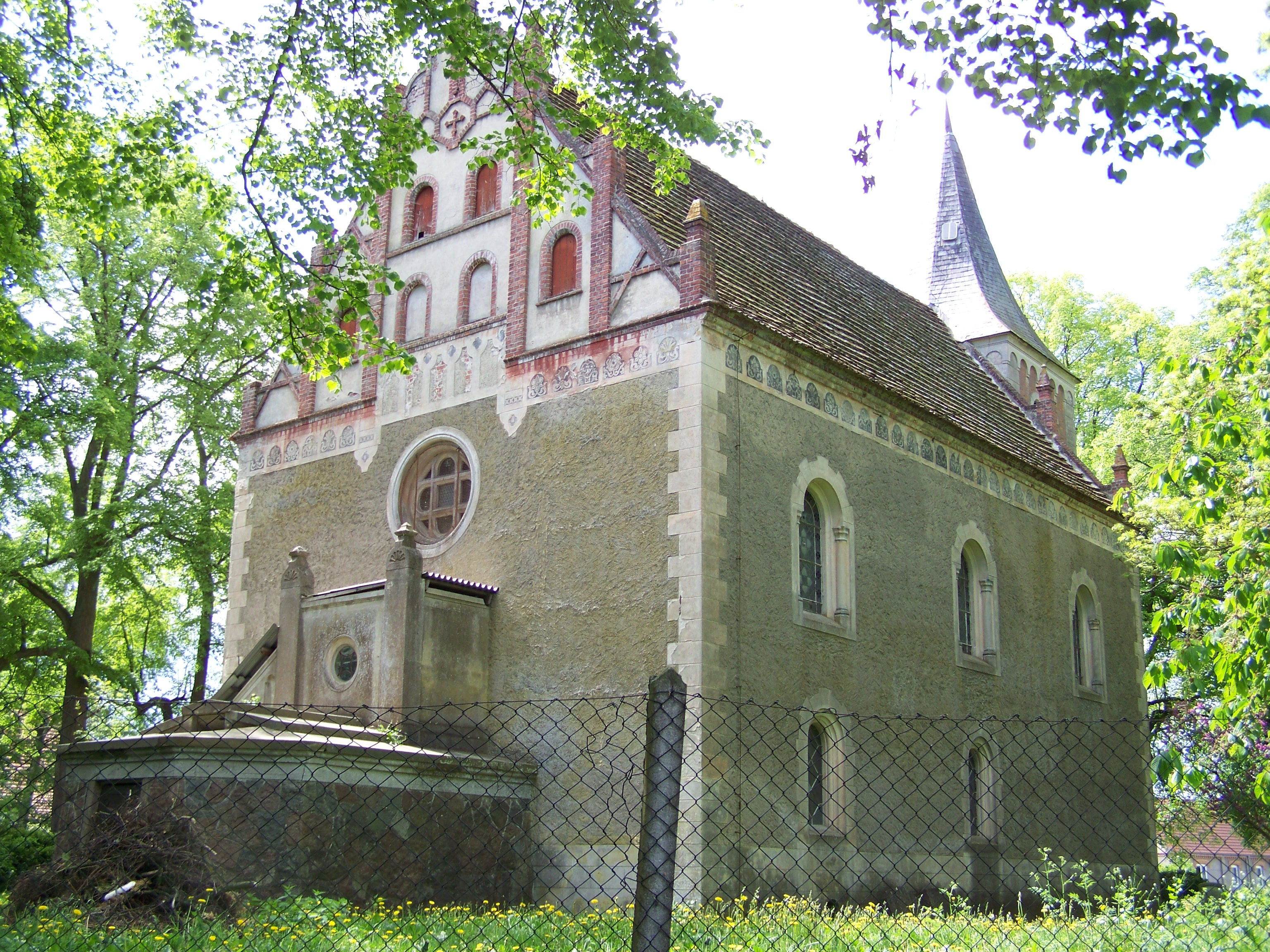 Kirche in Deyelsdorf, Vorpommern (2009-05-13)